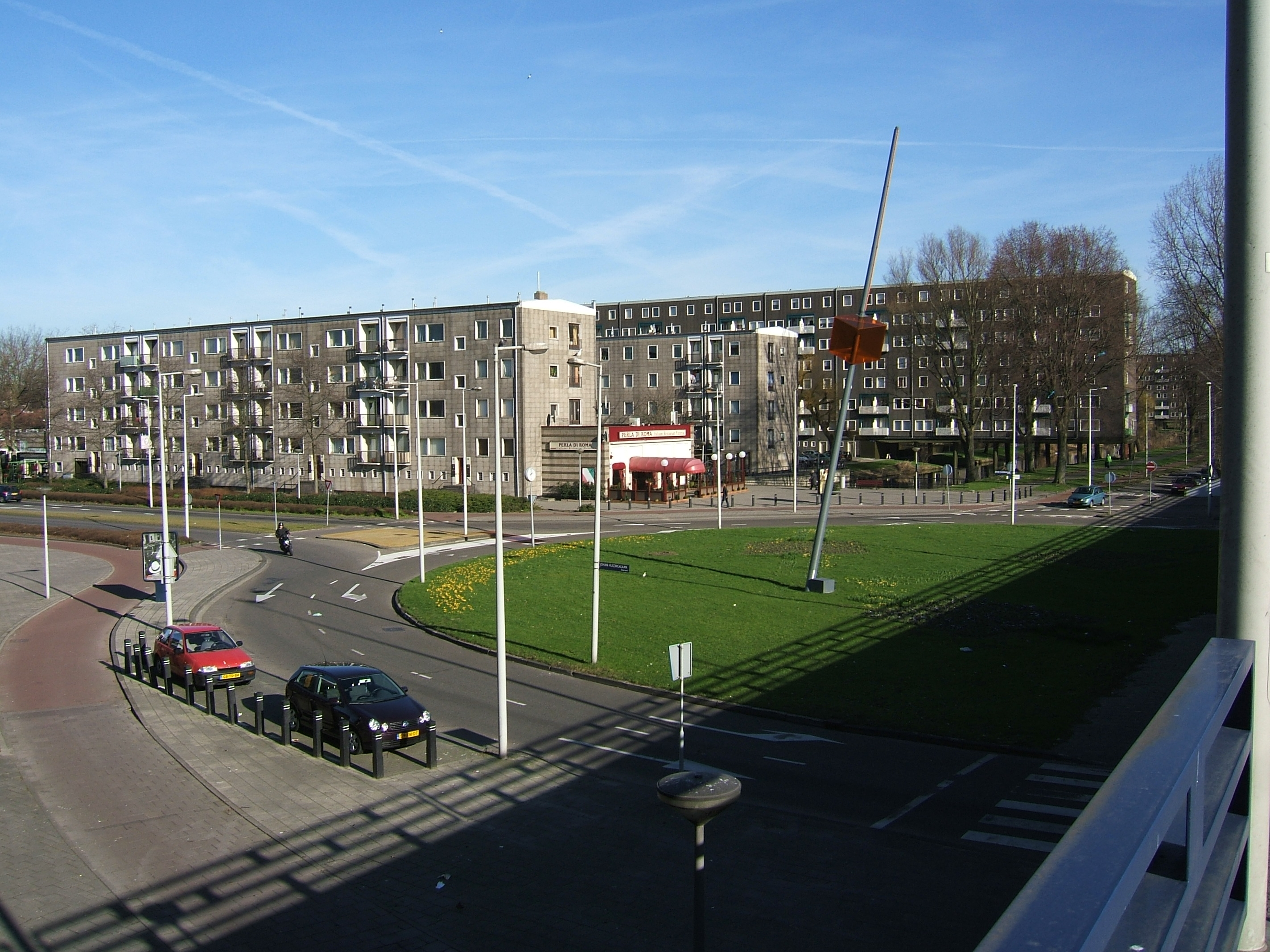 Amsterdam Sloterhof seen from Cornelis Lelylaan overpass over Johan Huizingalaan (Amsterdam-Slotervaart) Its number in the list of 89 proposed monuments is: 2013-34 For more information see Dutch Wikipedia: 89 topmonumenten uit de periode 1959-1965